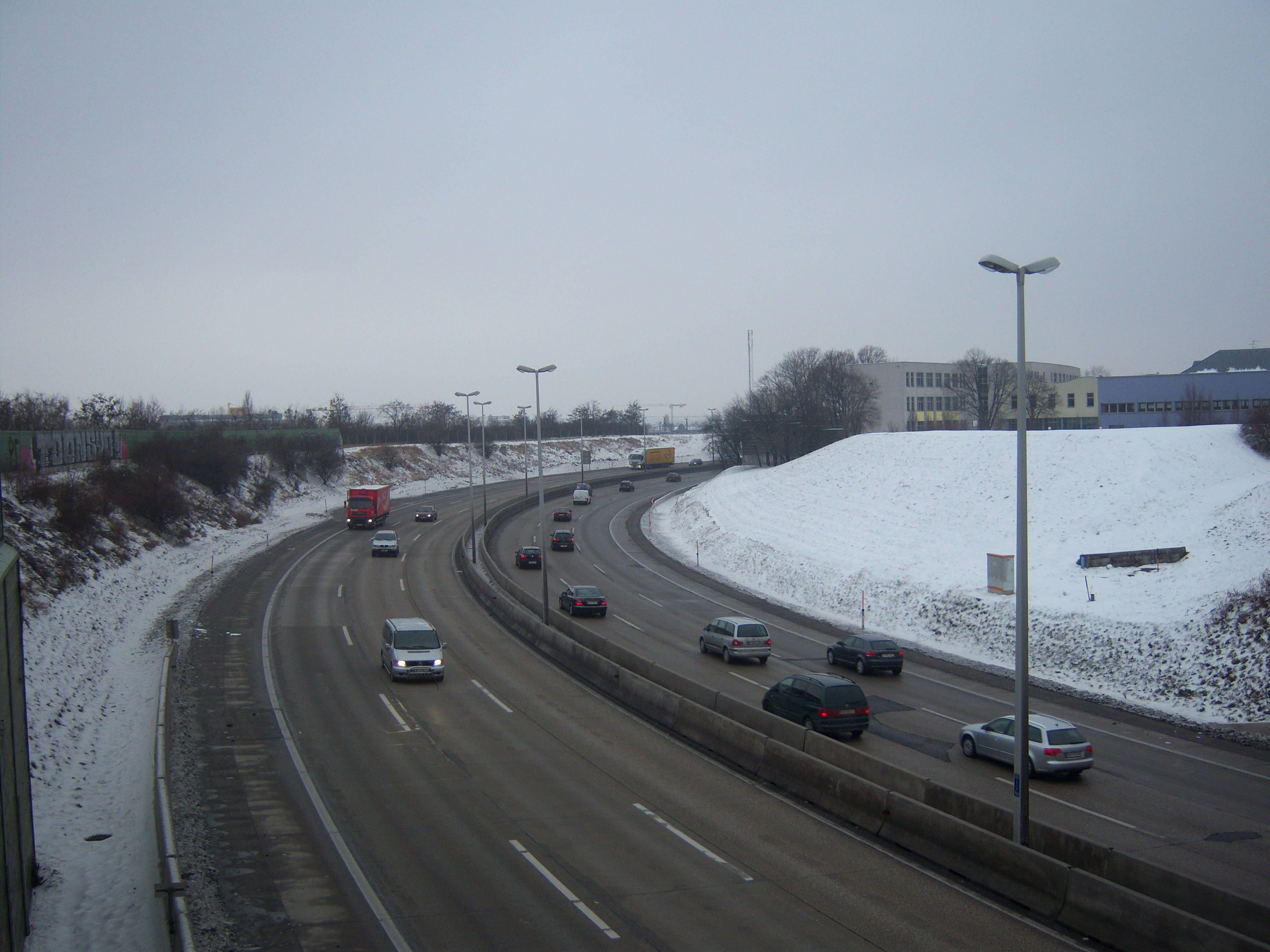 Die Hanssonkurve Richtung Norden im Zuge der Autobahn Südosttangente Wien A23